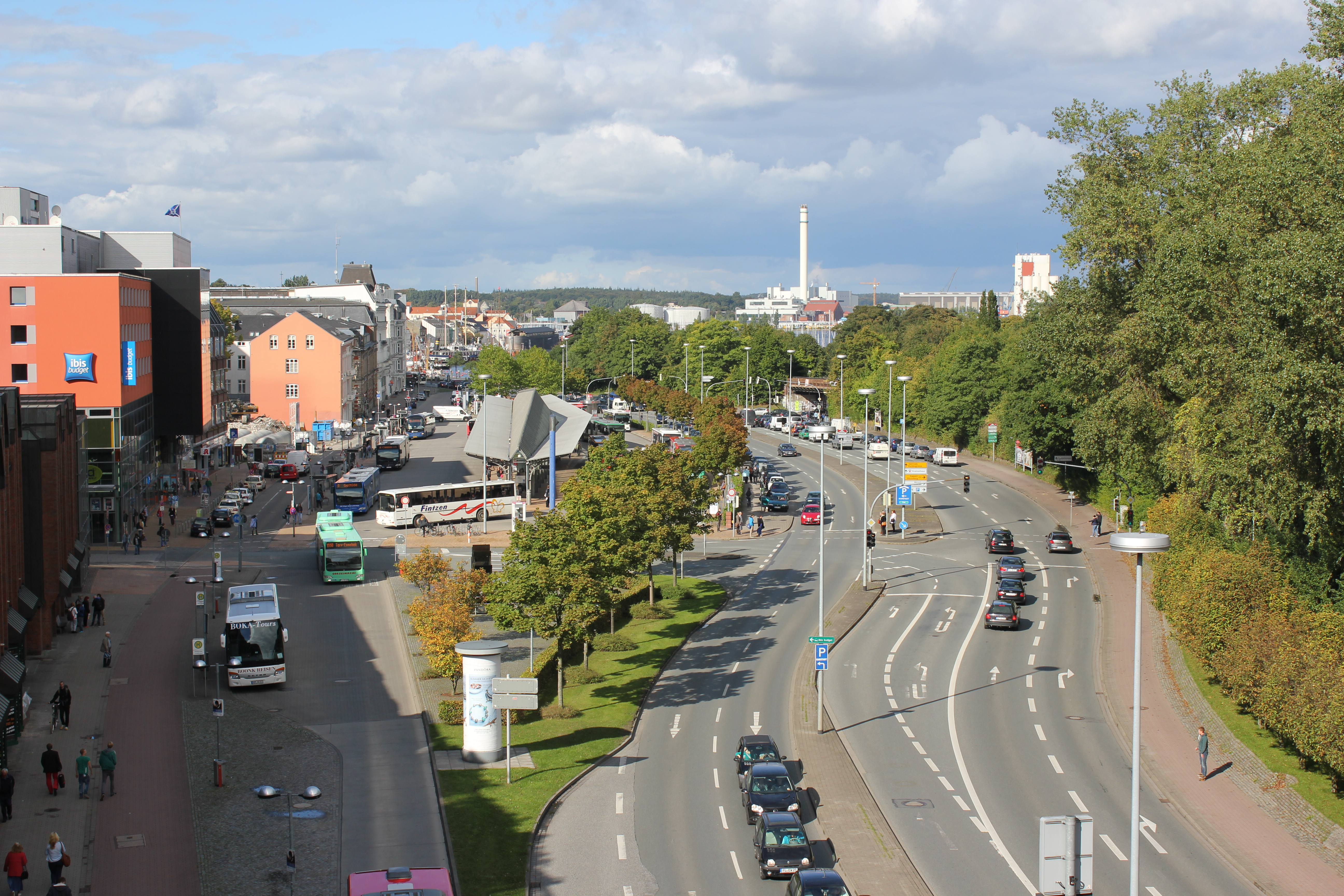 Zentraler Omnibus-Bahnhof (Flensburg 2013), Bild 01